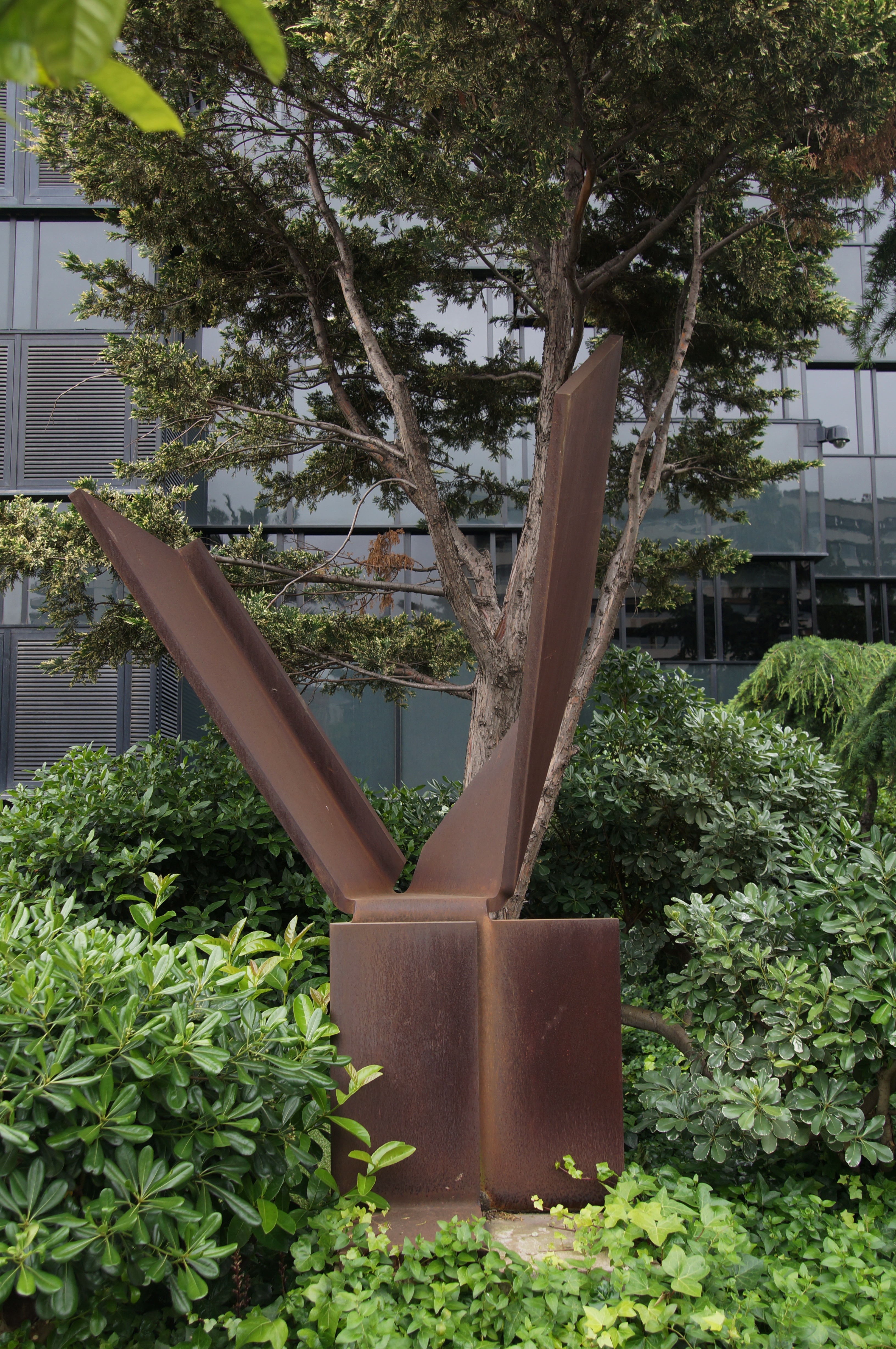 Dies de juny V (Pablo Palazuelo). Av. Diagonal, 621 (Barcelona)